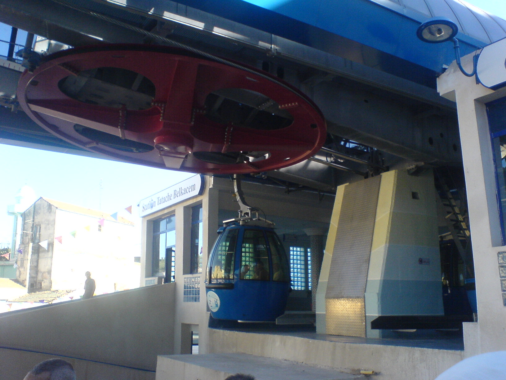 Quand la cabine se dettache du cable, la grande roue continue sa rotation (Télécabine à Constantine)